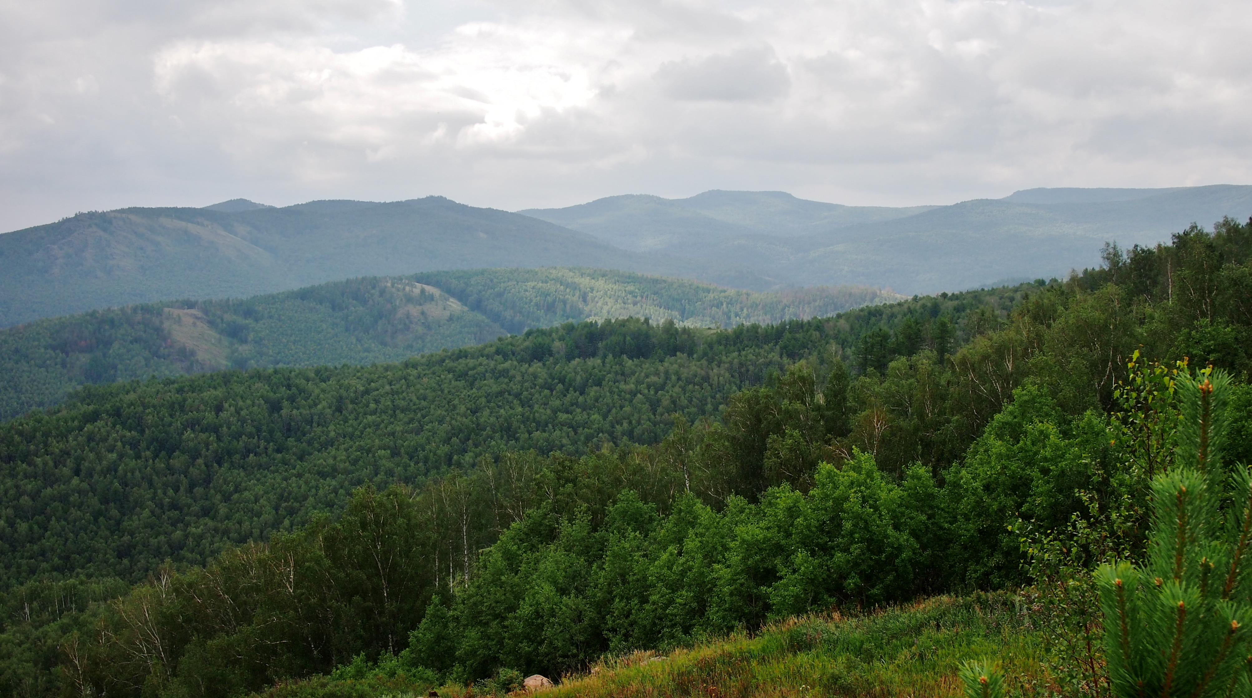 Уральские горы!